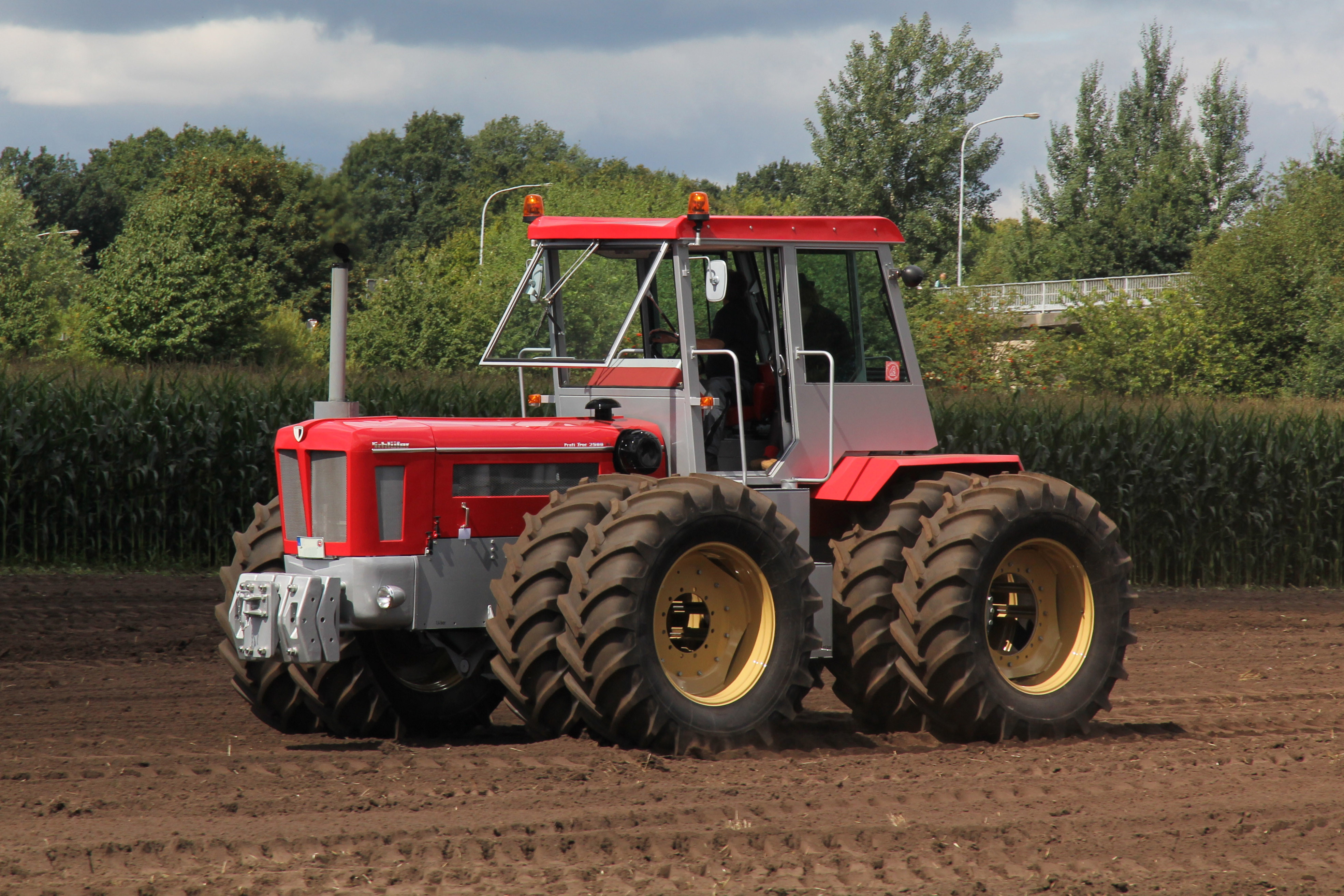 Schlüter Profi Trac 2500 VL mit 8-facher Bereifung auf dem historischen Feldtag in Nordhorn 2016